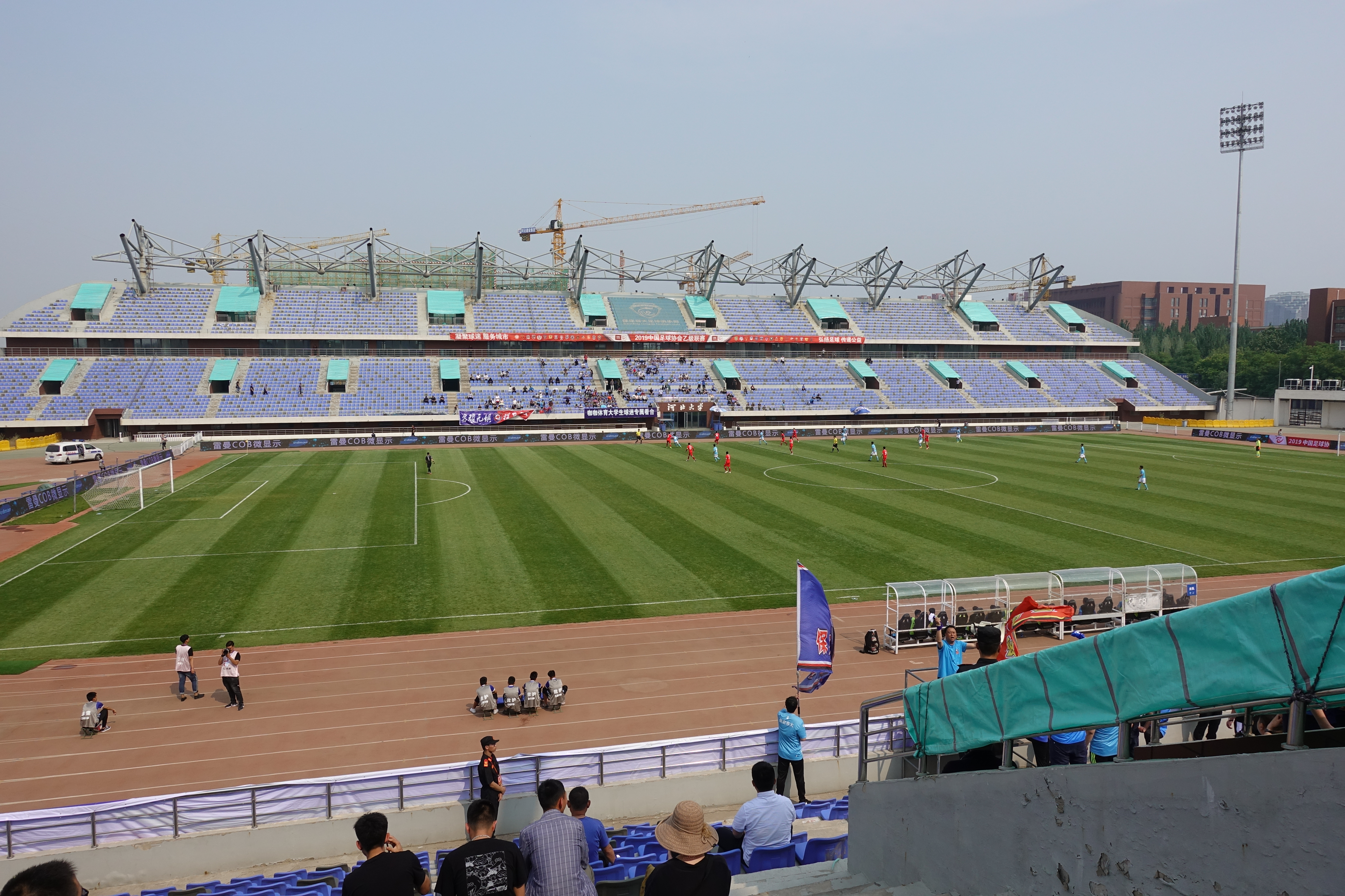 河北大学体育场，河北省保定市。中乙联赛现场。